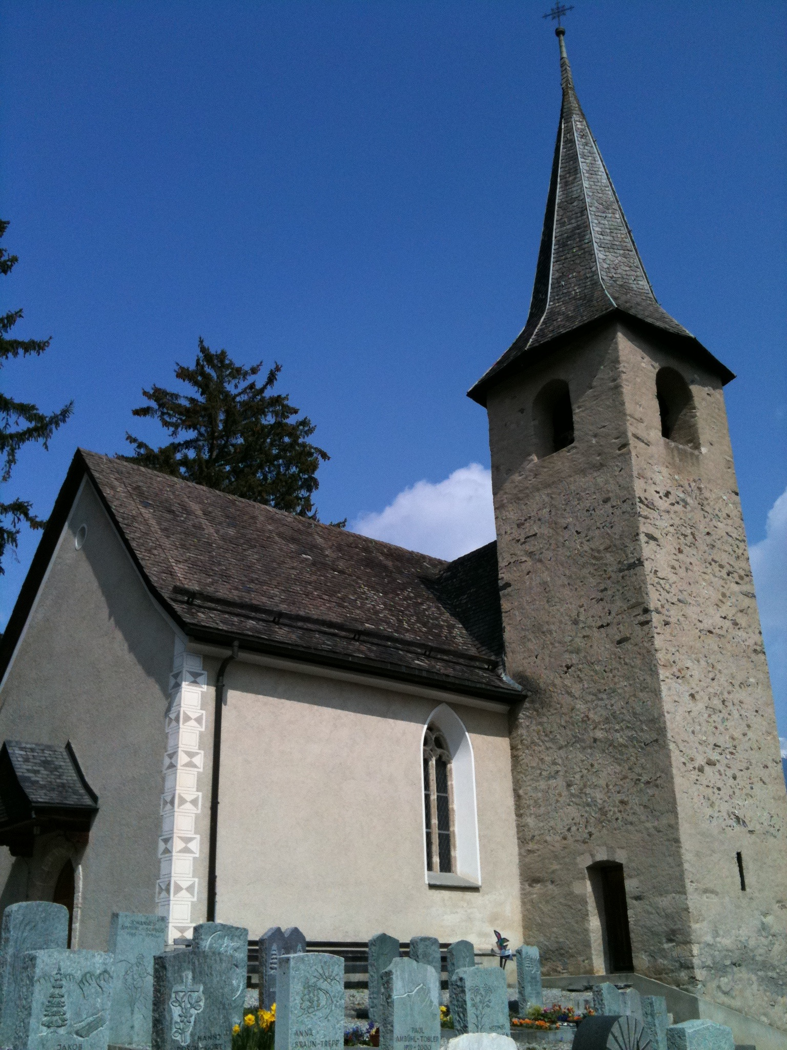 reformierte Kirche Masein, Kanton Graubünden